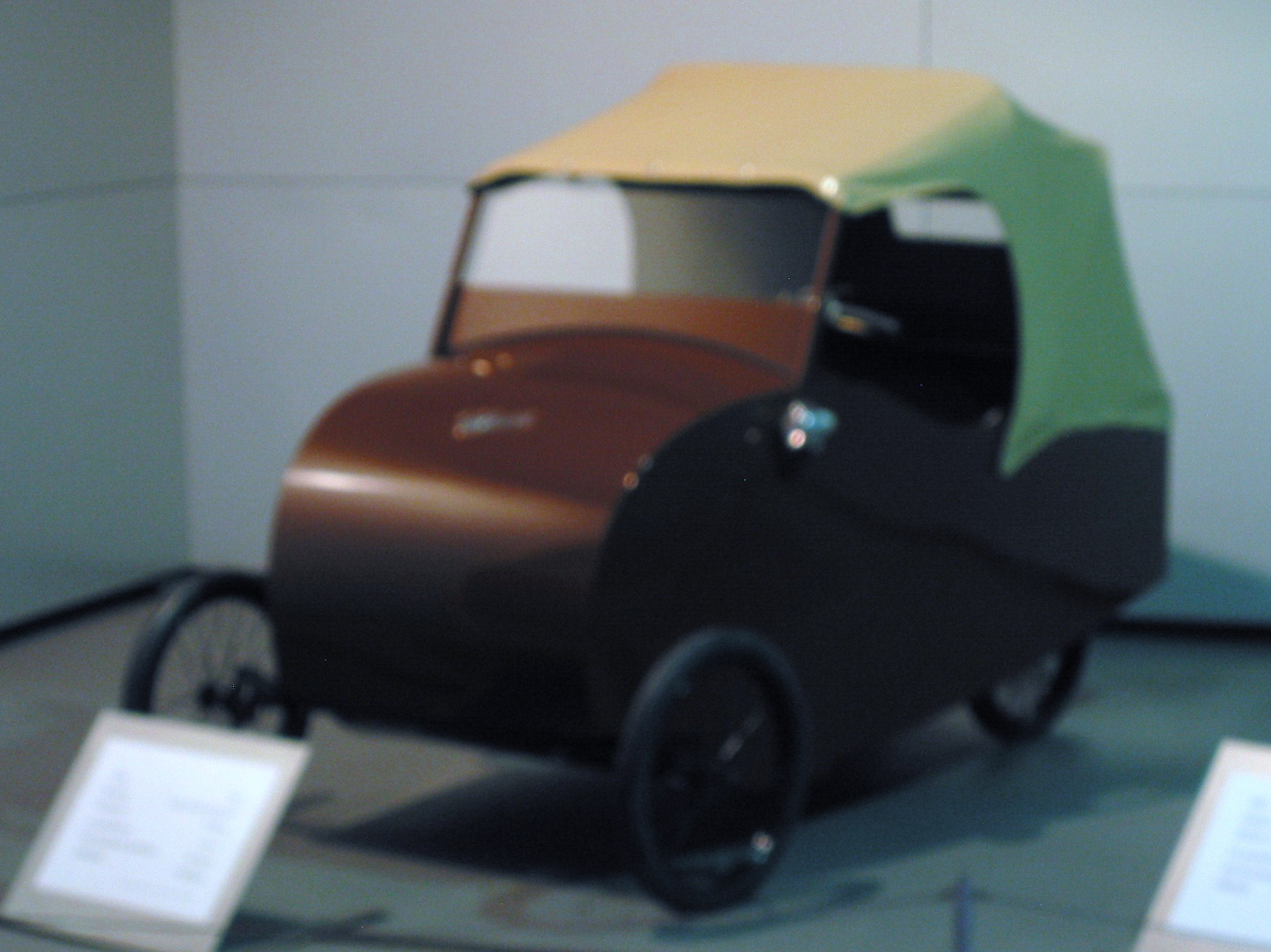 Mochet 1947